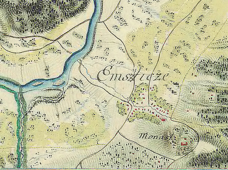 Карта Імстичева - 1782 рік